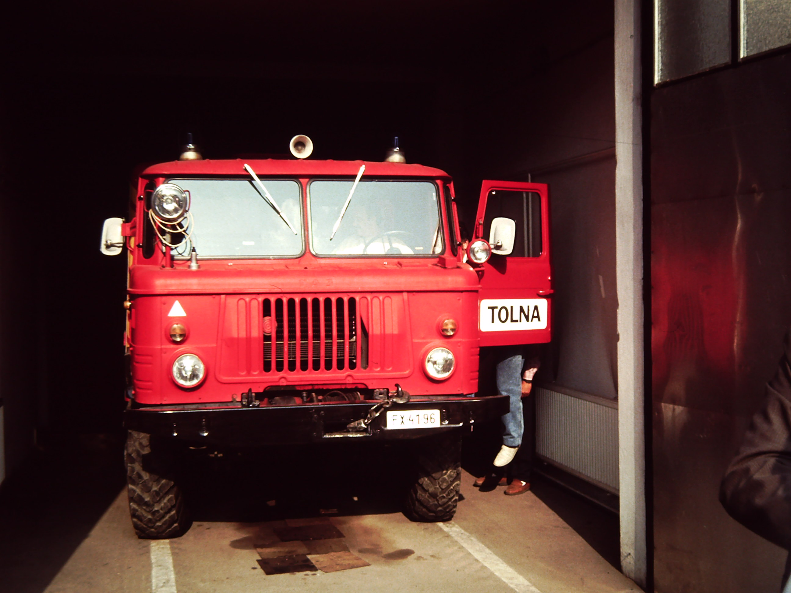 Feuerwehr Tolna